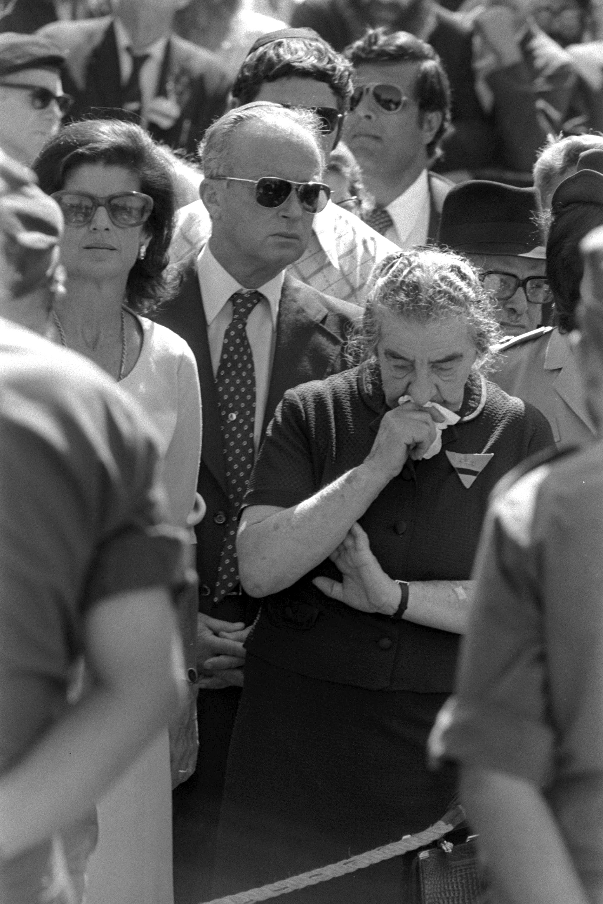 P.M. Yitzhak Rabin (Centre) And former P.M. Mrs. Golda Meir among the mourners near the grave side of Zalman Shazar on Mount Herzl. טקס הלוויה של זלמן שזר בהר הרצל, ירושלים. בצילום, ראש הממשלה לשעבר הגב' גולדה מאיר, ראש הממשלה יצחק רבין ורעייתו לאה בין האבלים. Photo: SAAR YAACOV, GPO, 07/10/1974.